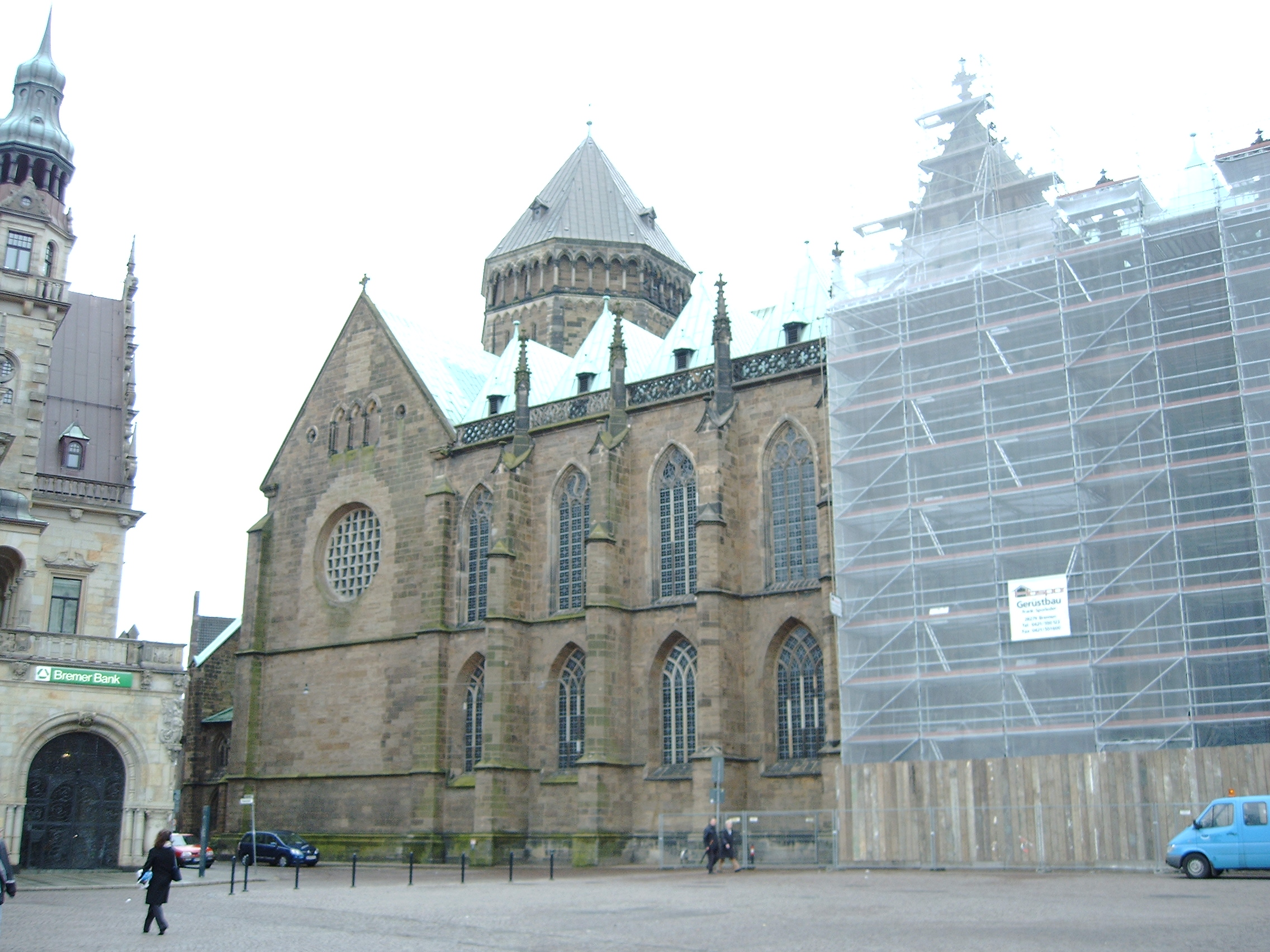 Rekonstrukce katedrály v Bremenu v Německu